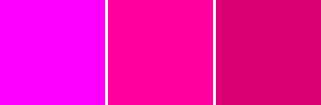 divers magentas : RVB, Pantone et Quadri